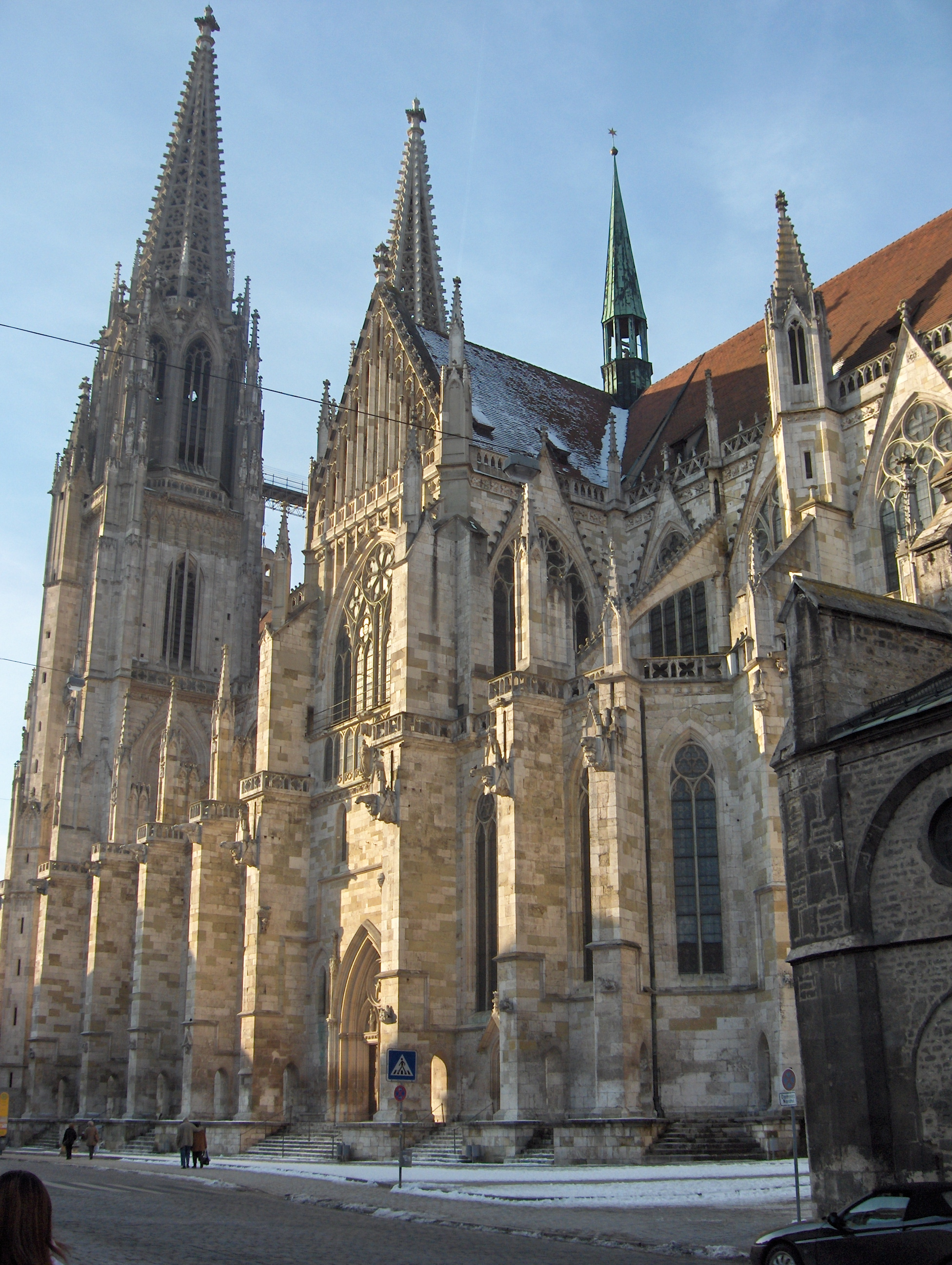 Dom St. Peter - Südfront